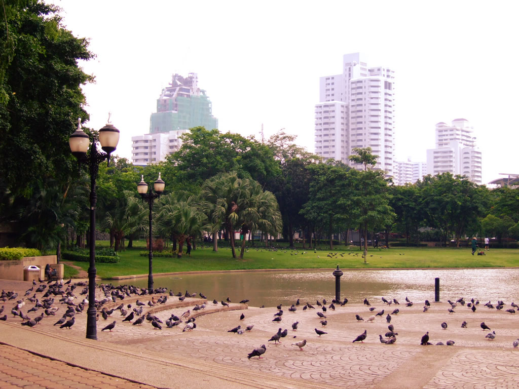 อุทยานเบญจสิริ กรุงเทพมหานคร สัญญาอนุญาต The present photo is taken or owned by Thanyakij. The camera used was: Fujifilm Finepix S9500. หมวดหมู่:สวนสาธารณะในกรุงเทพมหานคร หมวดหมู่:ภาพสถานที่ ในกรุงเทพมหานคร